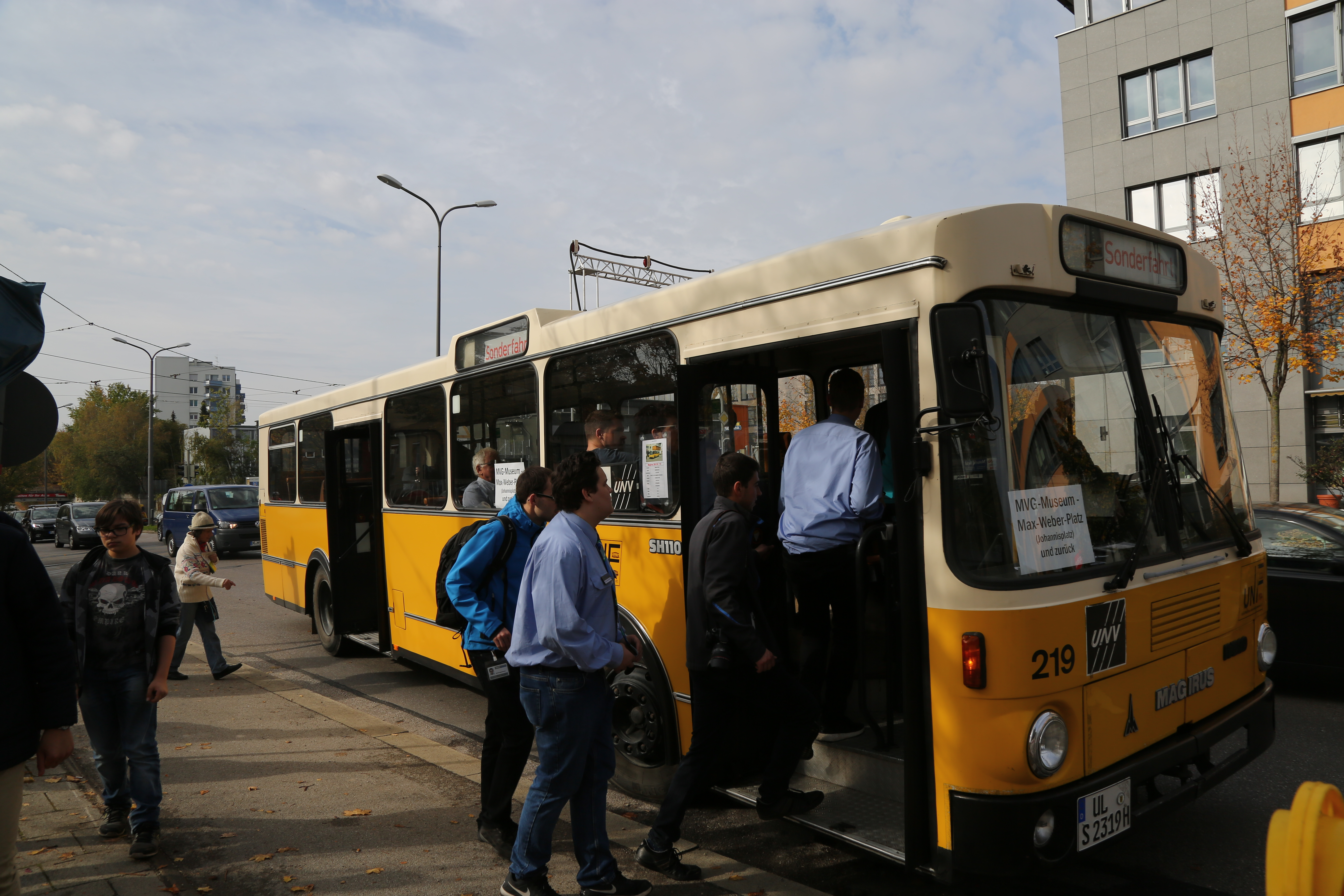 Ehemaliger Linienbus bei einer Sonderlinienfahrt zwischen dem MVG Museum und Max-Weber-Platz zum 10-jährigen Museumsjubiläum.